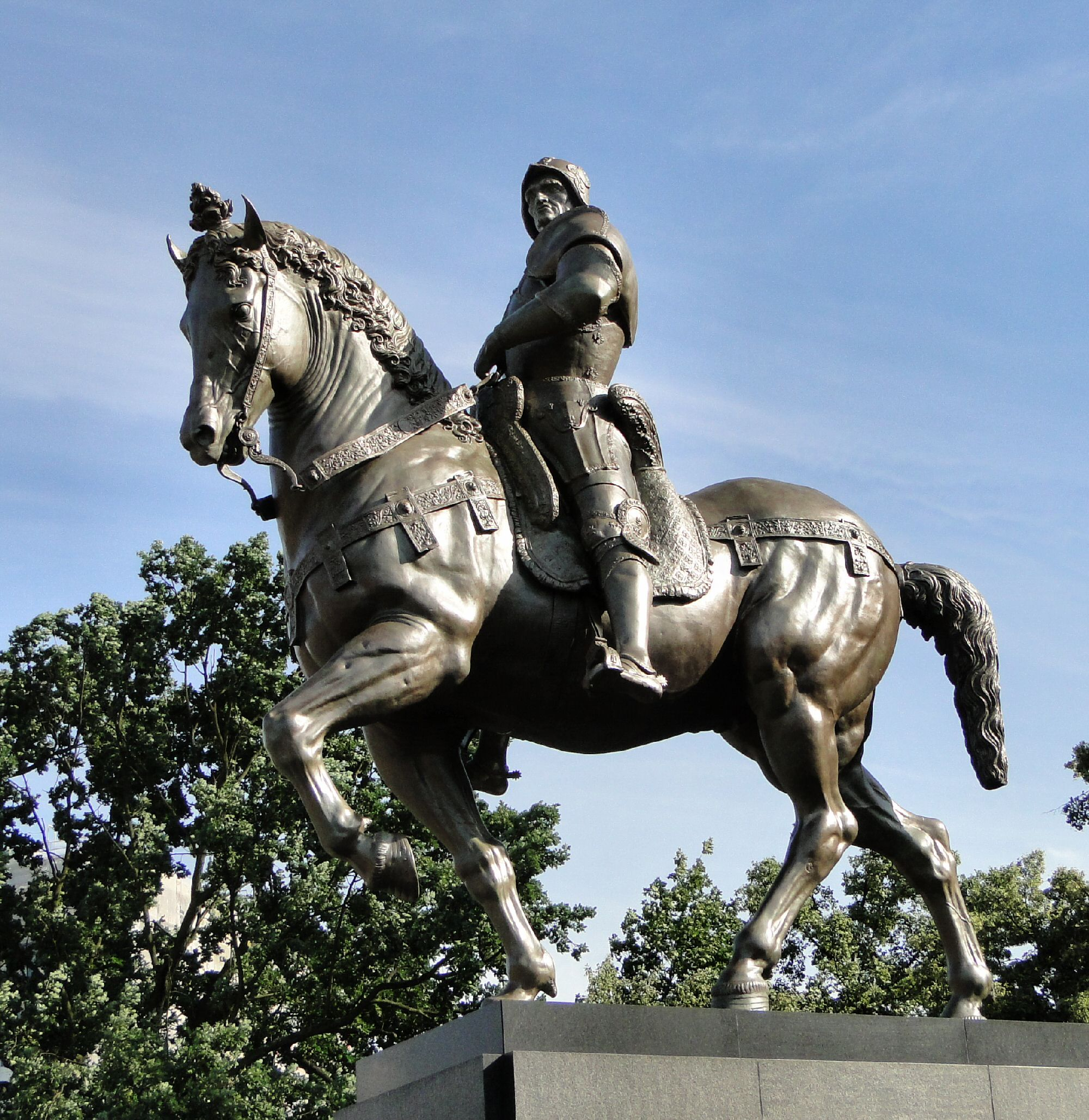 Pomnik Colleoniego w Szczecinie